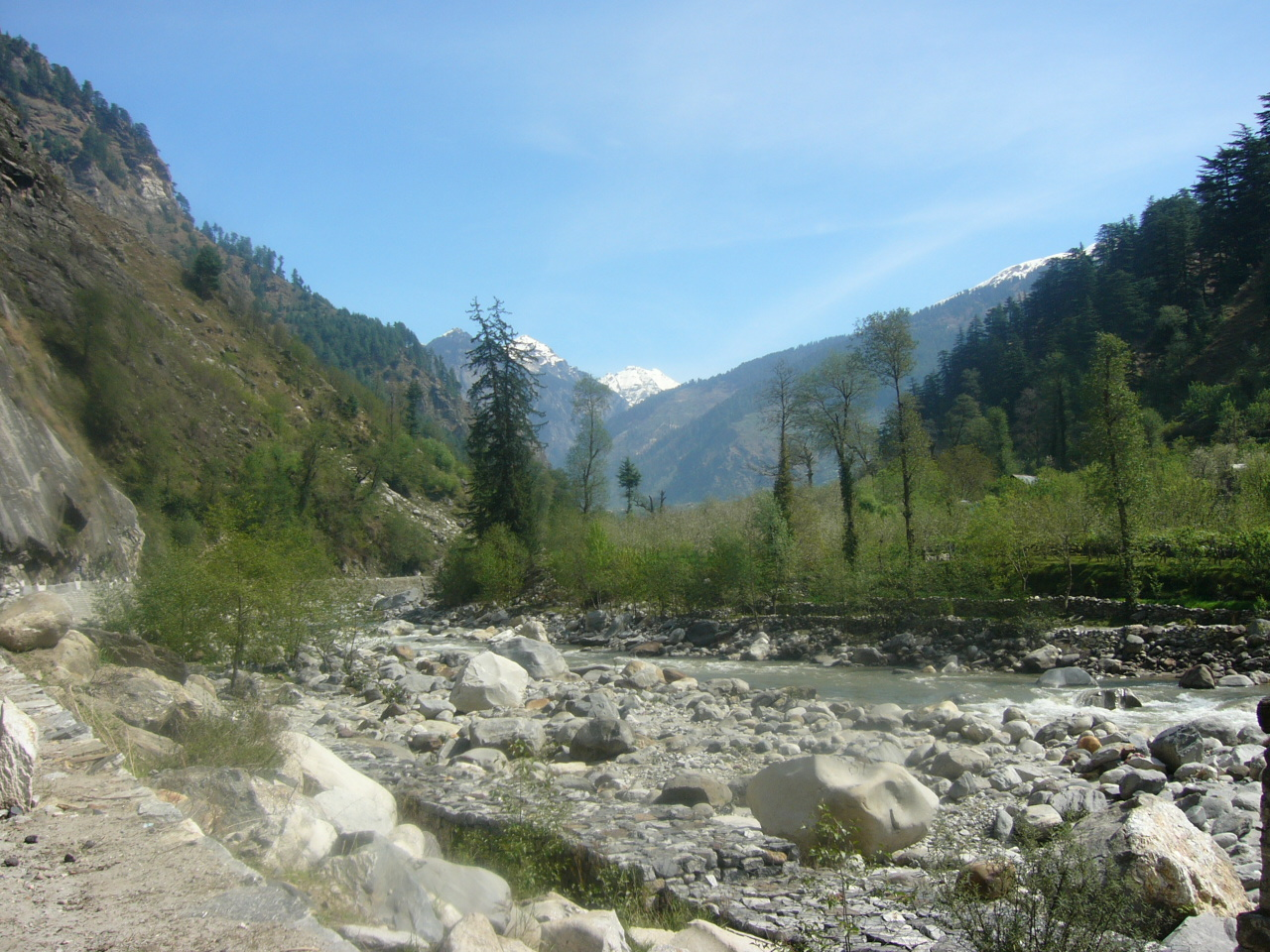 Manali Himachal India